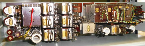 Wechselstromübertragung